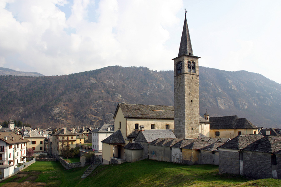 Panorama di Malesco (VB). Sulla destra la chiesa parrocchiale ed il cimitero.